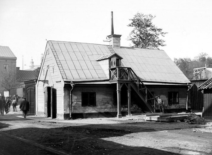 F.d. Järnvågshuset på Djurgården, senare Djurgårdens första brandstation